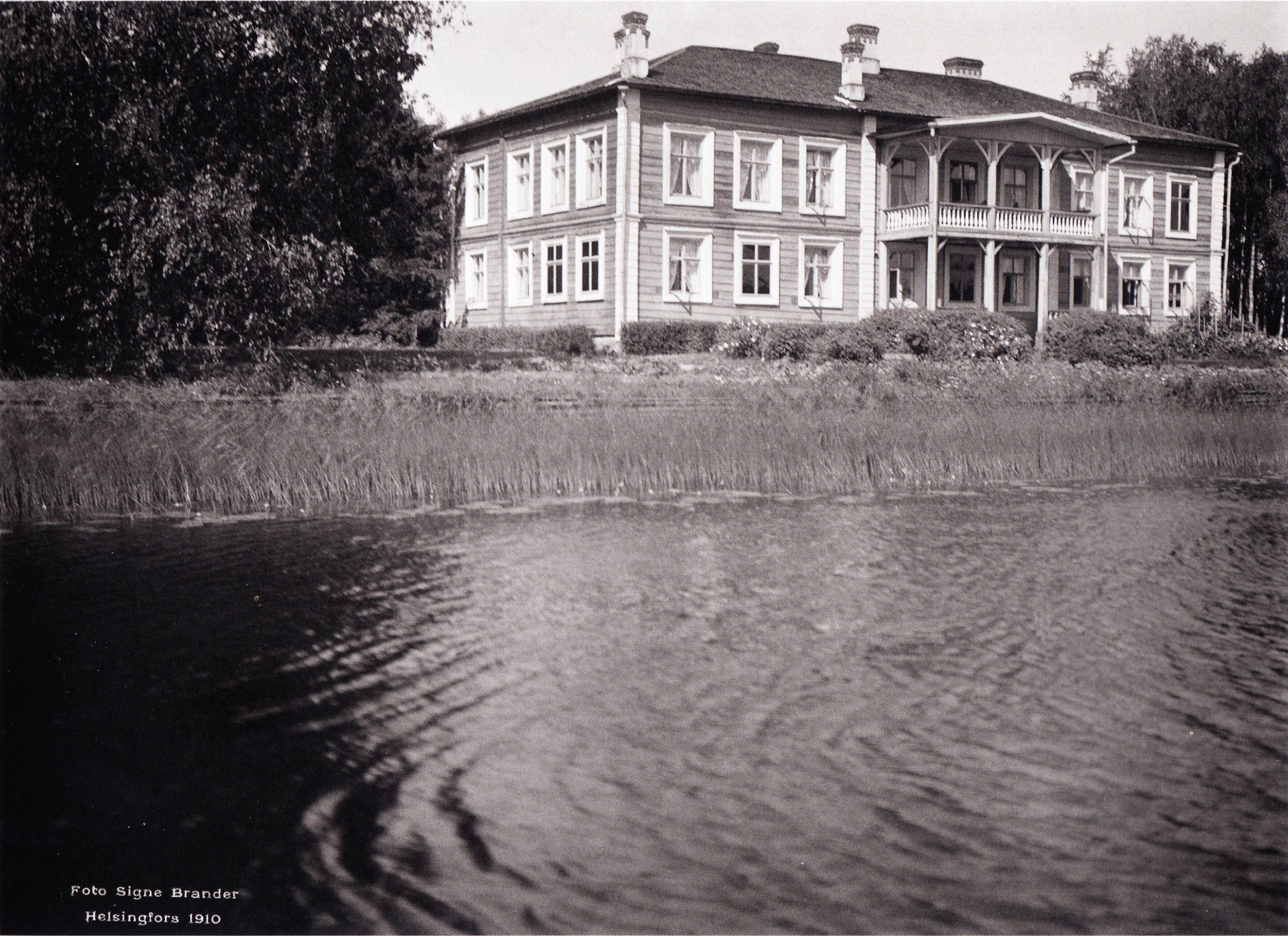 Rabbelugnin kartano